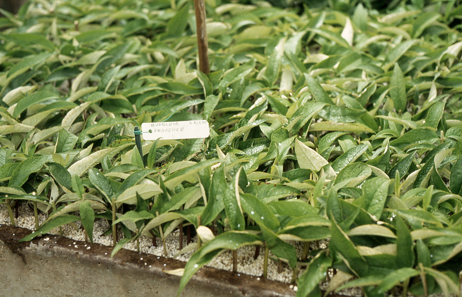 Buddleja davidii ожиљавање зелених резница у перлиту (аутор: Михаило Грбић).